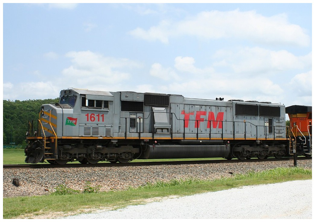 Grupo Transportación Ferroviaria Mexicana railroad 1611 EMD SD70MAC [1]